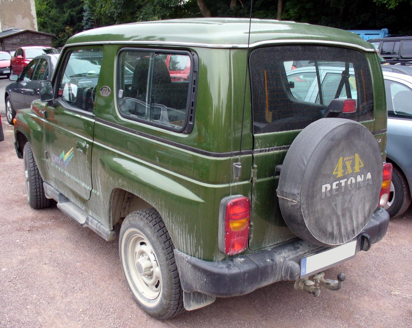 Kia Retona